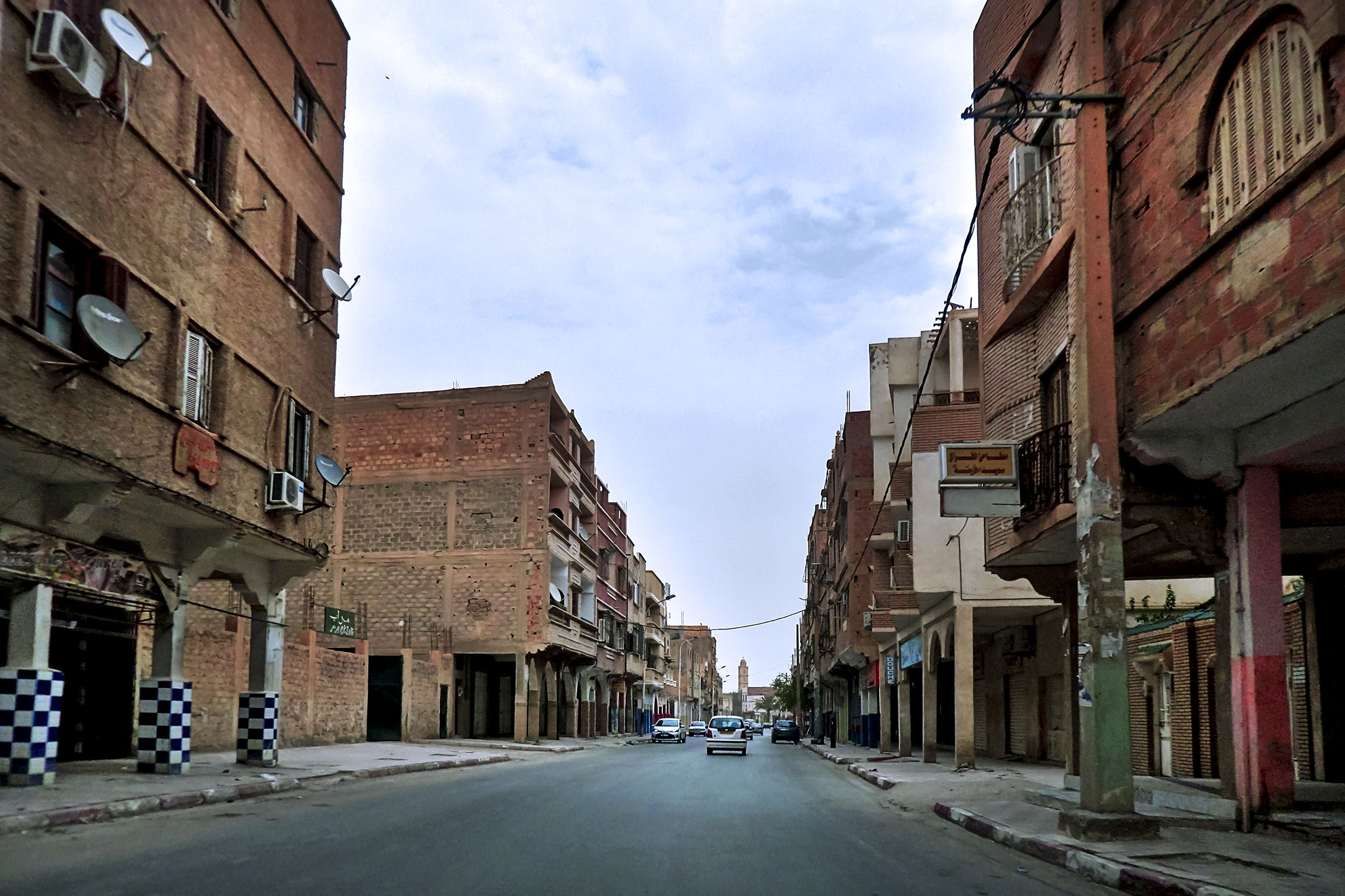 Biskra بسكرة